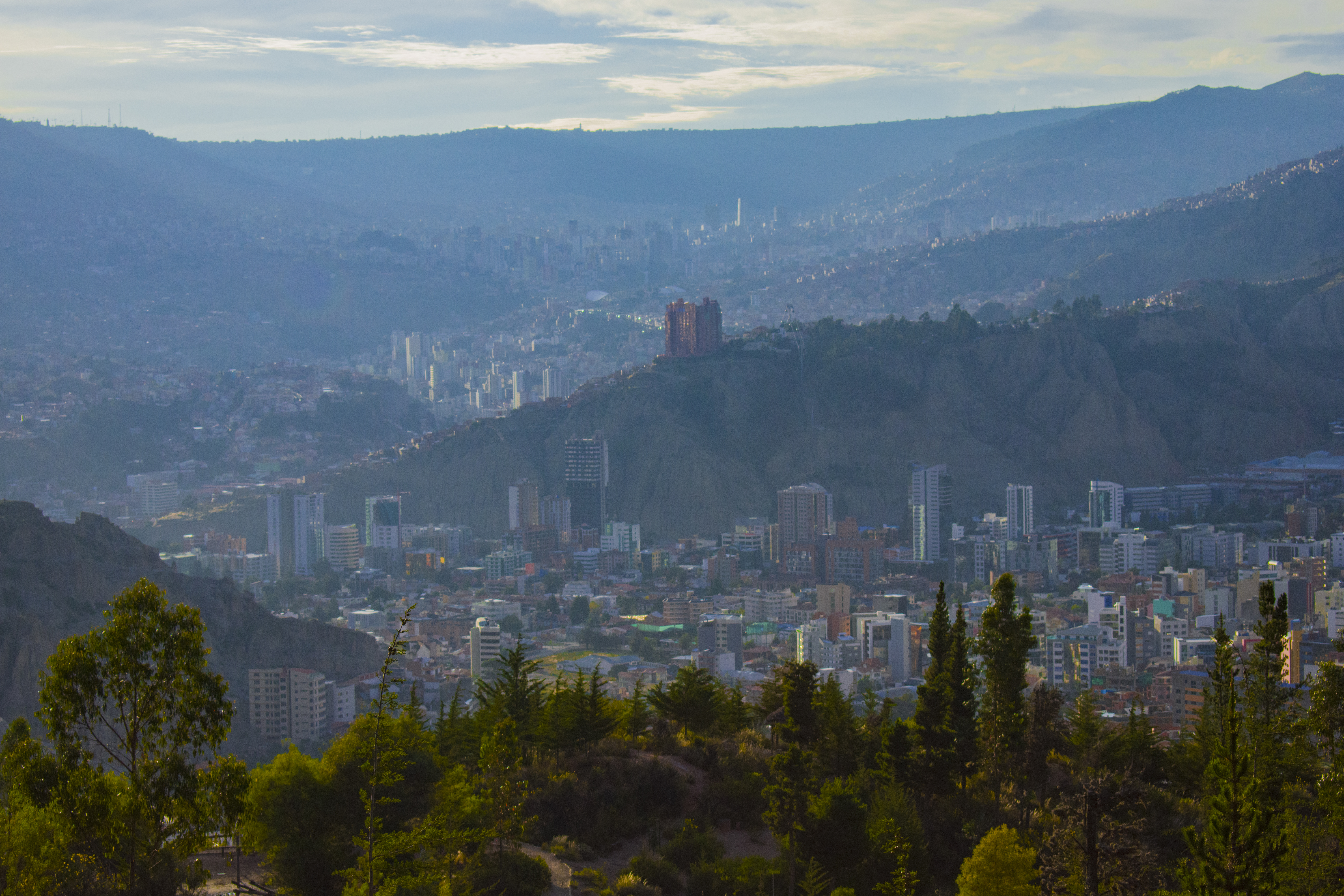 La Paz desde el bosquecillo de Auquisamaña